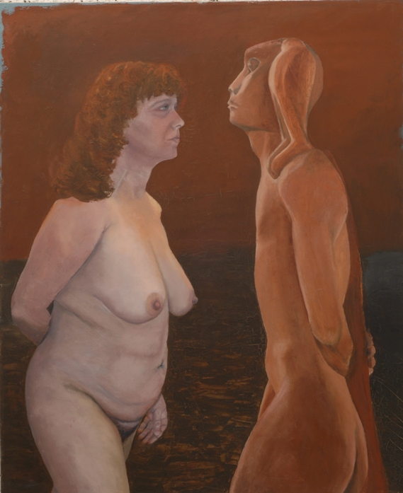 נמרוד ואת, ציירה אורה ראובן, 2007